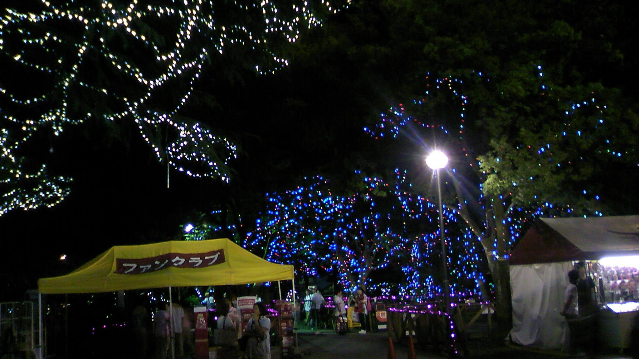 クリネックススタジアム宮城のイルミネーション